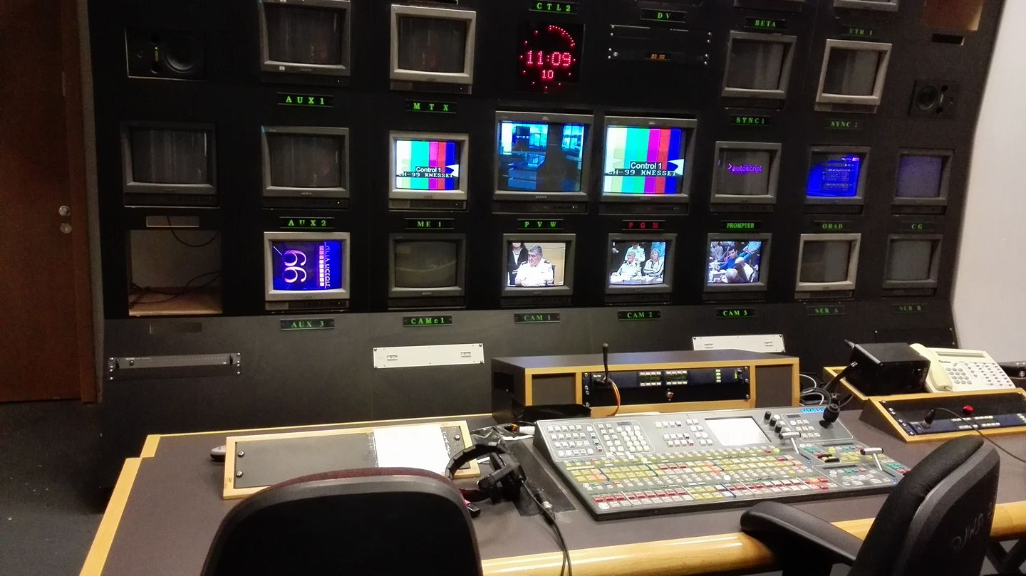 חדר הבקרה באולפני ערוץ הכנסת שבמשכן הכנסת